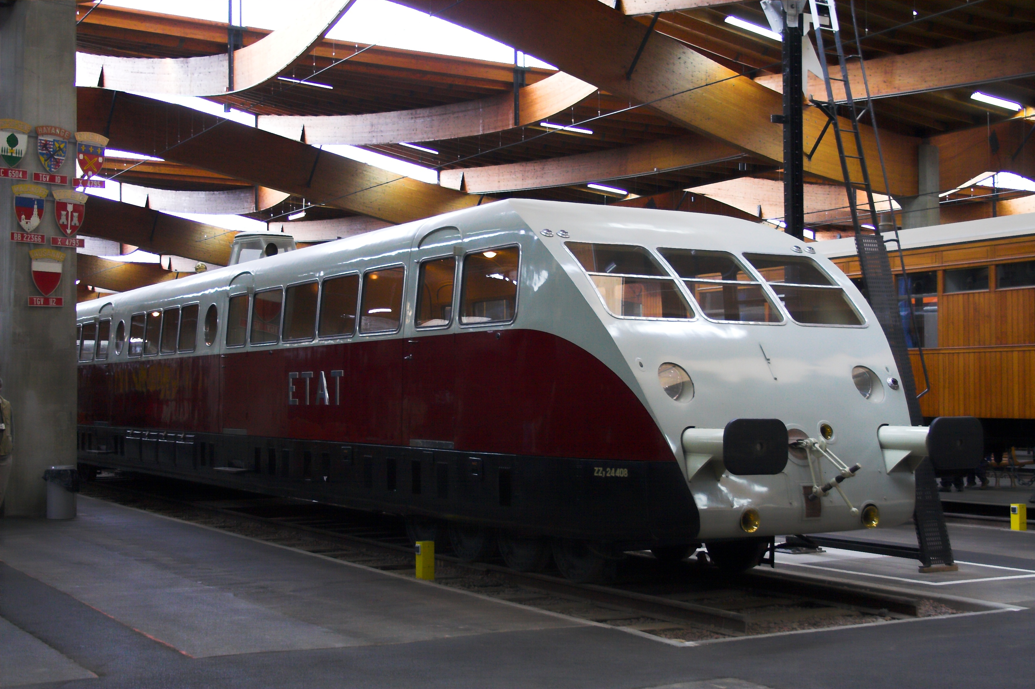 an autorail Bugatti at Cité du Train de Mulhouse(Mulhouse, France)